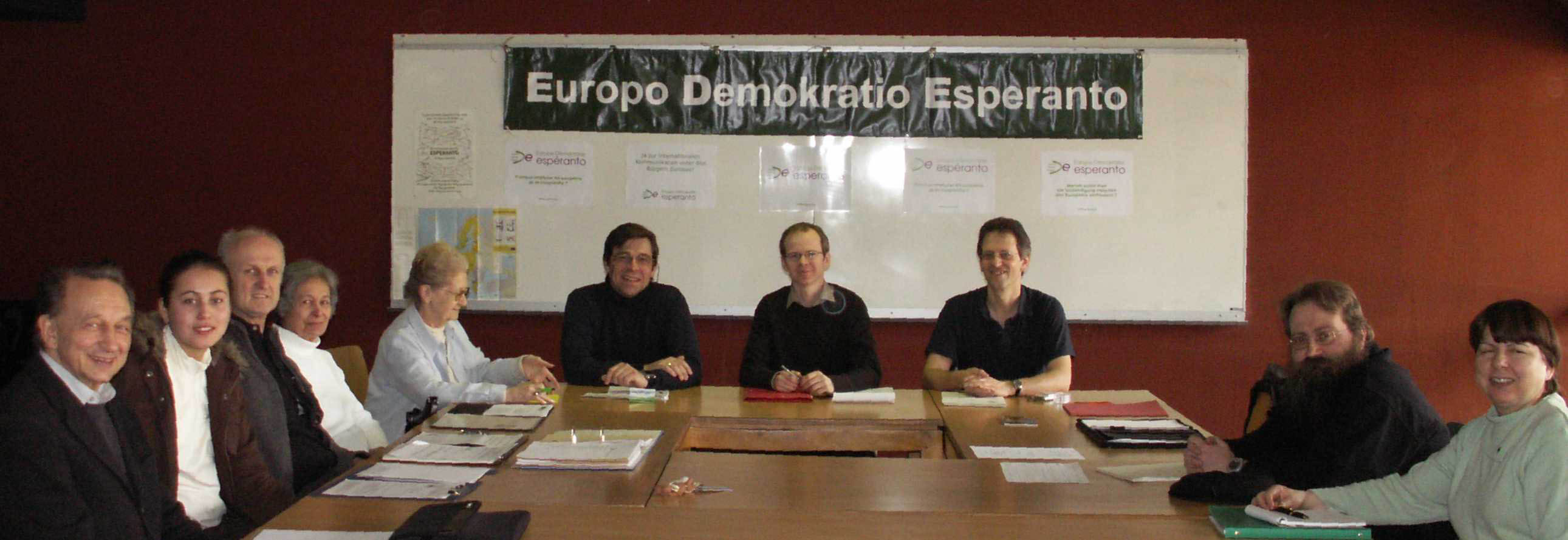 Teilnehmer der 1. Internationalen EDE-Konferenz in Straßburg, 27.02.-01.03.2009